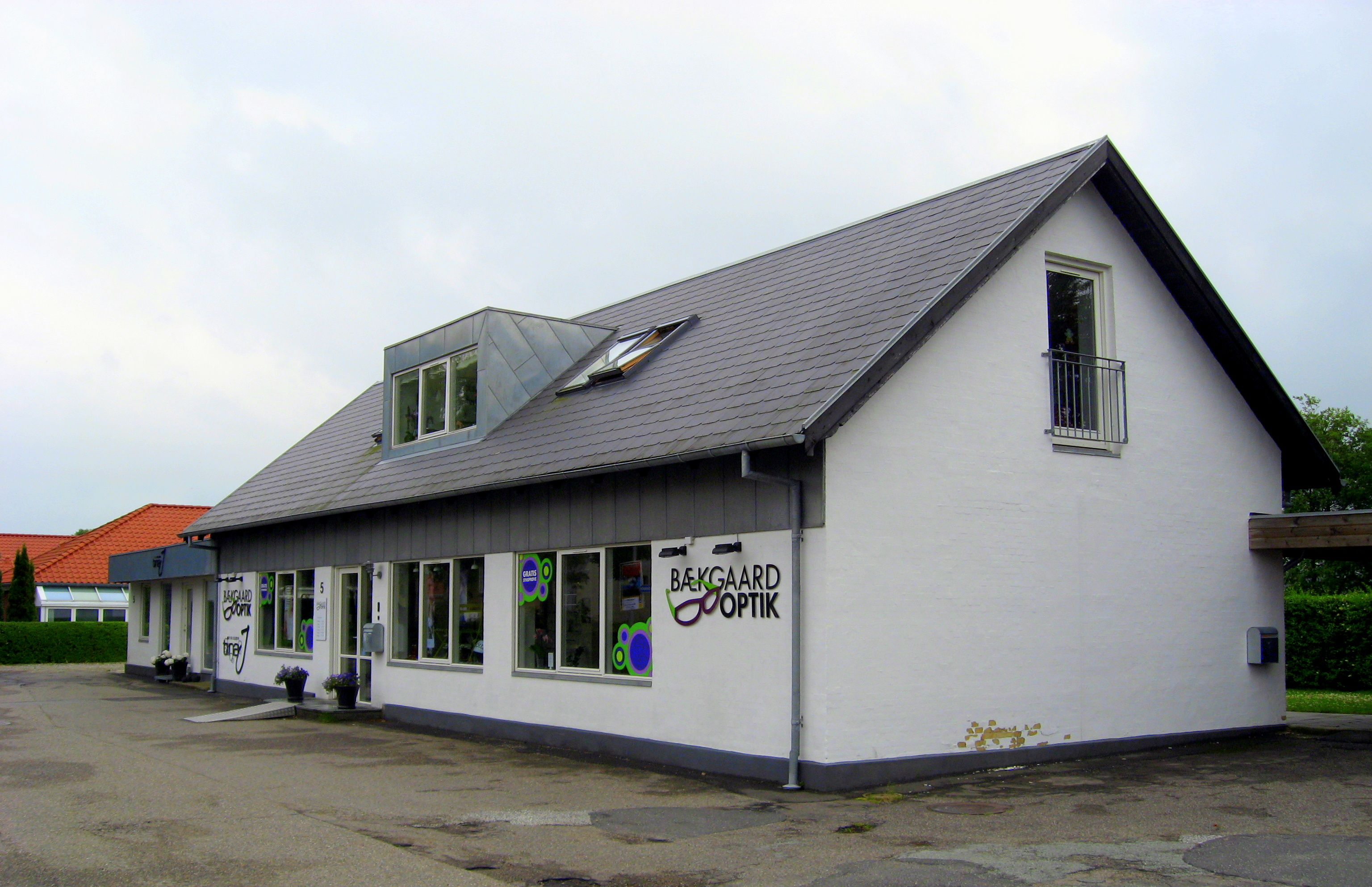 Den gamle station i Vodskov, Aalborg Kommune